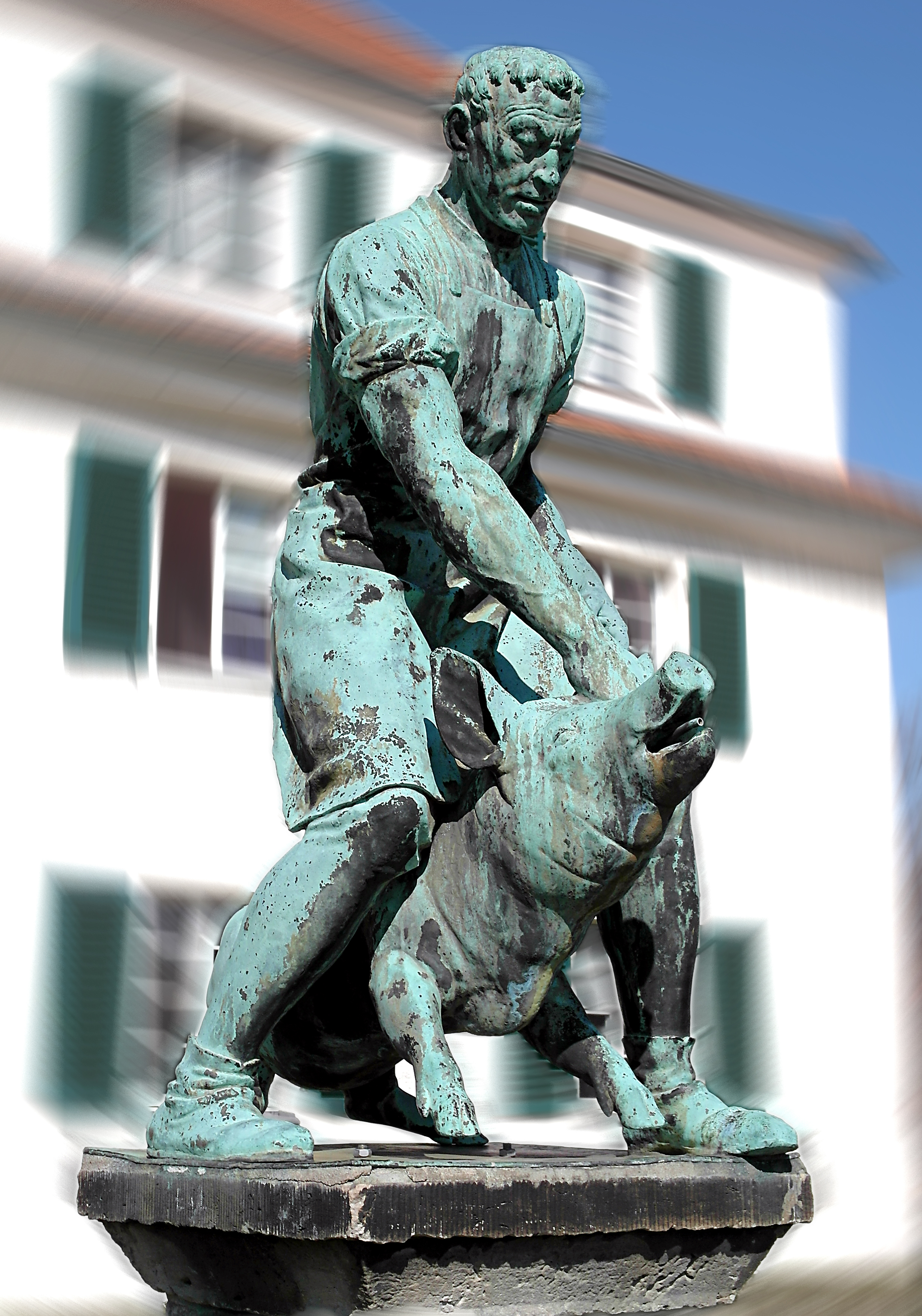 21.03.2019 21.03.2019 01067 Dresden-Friedrichstadt / Ostragehege, Messering 25: Auf dem Areal des einst modernsten und größten deutschen Vieh- und Schlachthofs (GMP: 51.070045,13.715547), erbaut von 1902-1910, steht der Schweinetreiberbrunnen (GMP: 51.068478,13.720223), den Georg Wrba 1910 schuf. Der Standort war ursprünglich die Schlachthofstraße, die mit dem Umbau des Erlwein-Schlachthofs zur MESSE DRESDEN in Messering umbenannt wurde. [SAM0051.JPG]20190321120DR.JPG(c)Blobelt